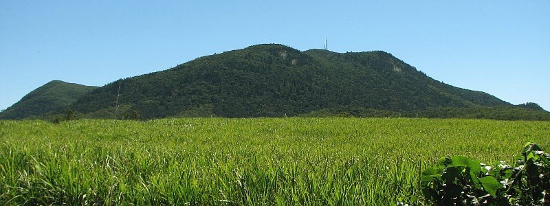 Mt Blackwood, Queensland